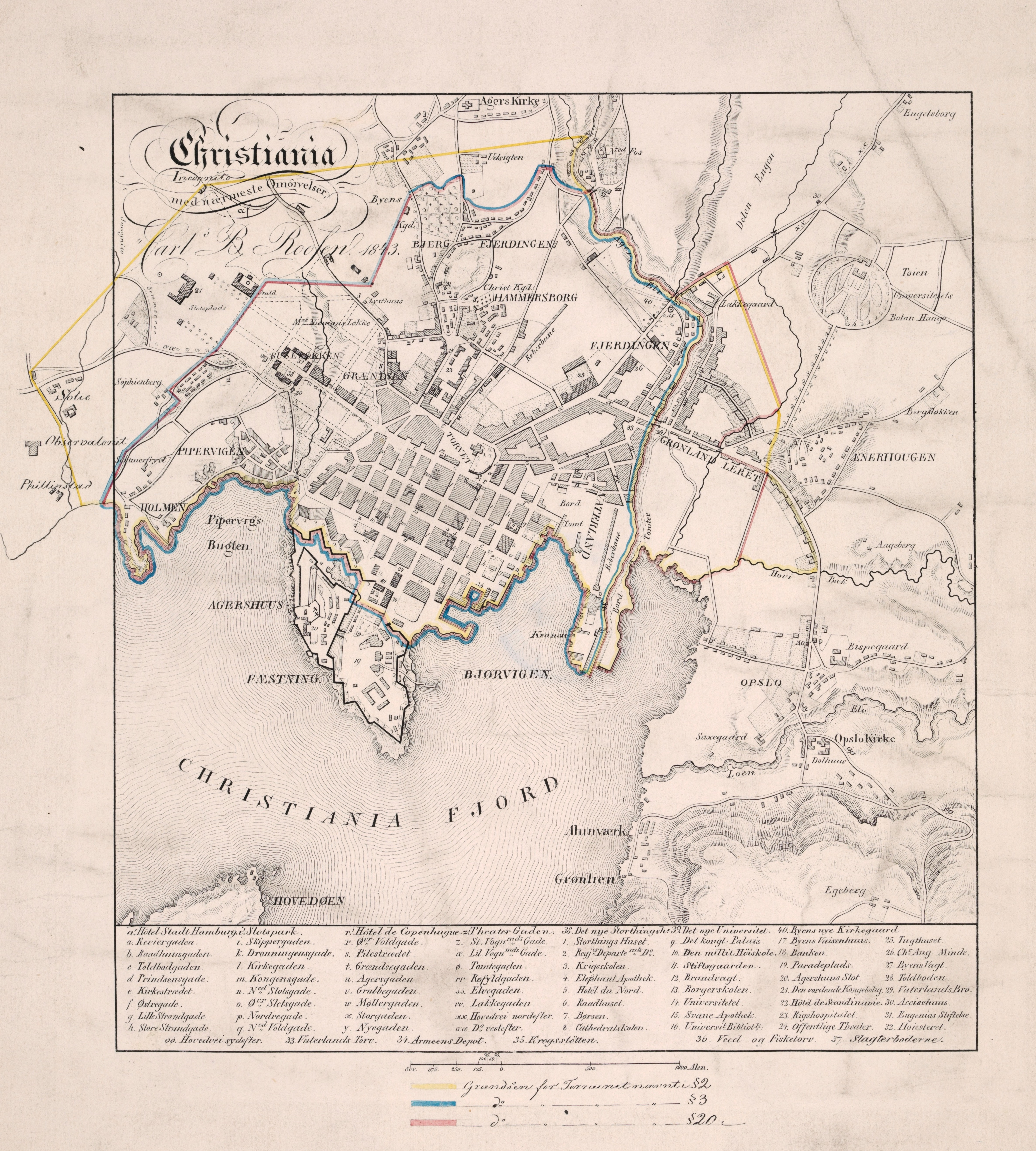 Kart fra Nasjonalbibliotekets kartsamling. Kartet er gitt ut i (1843) og viser Christiania.